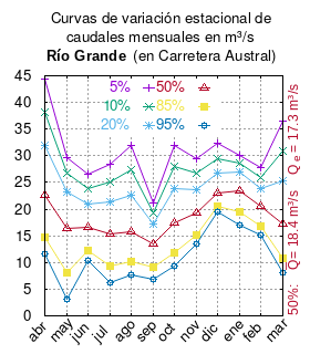 Curvas de variación estacional del río Grande en Carretera Austral. # Dirección General de Aguas # Diagnóstico y clasificación de los cursos y cuerpos de agua según objetivos de calidad. Cuenca del río Cisnes. # Santiago de Chile # Ministerio de Obras Públicas (Chile) # 2004 # url: # urlarchivo: # Tabla 4.4: Río Grande en Carretera Austral (m3/s), pág. 33 mes 5% 10% 20% 50% 85% 95% abr 44.339 38.208 31.905 22.606 14.788 11.525 may 29.635 26.703 23.151 16.362 8.000 3.088 jun 26.478 23.850 21.014 16.498 12.246 10.280 jul 28.346 25.085 21.458 15.408 9.304 6.300 ago 32.038 27.392 22.656 15.763 10.083 7.756 sep 21.230 19.365 17.209 13.383 9.158 6.904 oct 31.944 27.941 23.769 17.467 11.868 9.328 nov 29.535 26.680 23.704 19.209 15.217 13.405 dic 32.334 29.481 26.744 23.116 20.516 19.580 ene 30.077 28.632 26.881 23.536 19.415 16.994 feb 27.726 25.925 23.901 20.457 16.891 15.094 mar 36.428 30.874 25.269 17.224 10.744 8.144 This plot was created with Gnuplot.